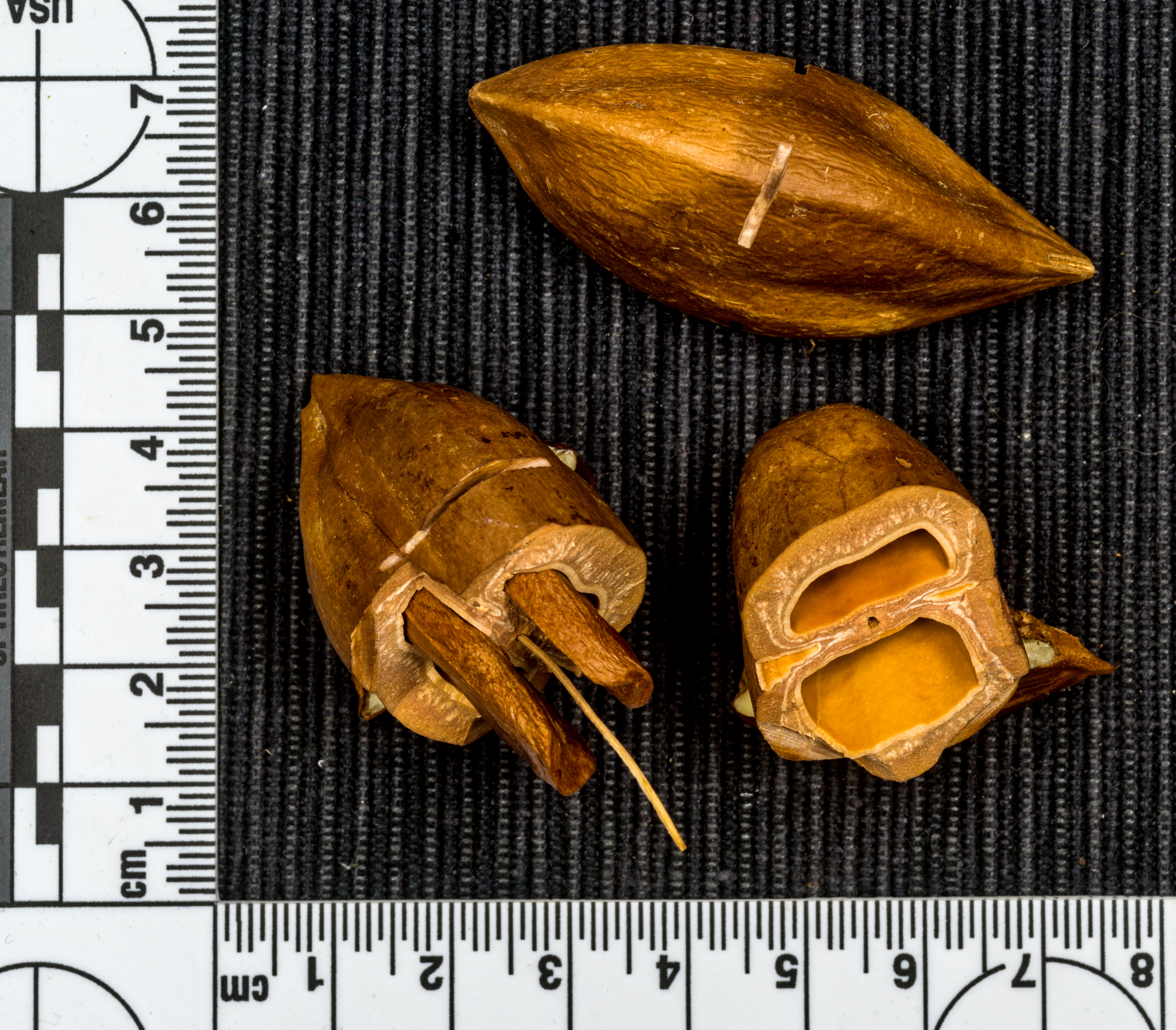 Früchte des Canarium ovatum der Name in der Heimat werden sie Kedongdong genannt, hier heißen sie Pilinuss auch wenn es eine Steinfrucht ist mit einer Länge von 3,5 bis 7 Zentimeter und einem Durchmesser von 2,3 bis 3,8 Zentimeter is Sie ist eiförmig bis ellipsoid, spitz und im Querschnitt dreieckig. Bei Reife besitzen die Früchte ein Gewicht zwischen 15,7 und 45,7 g.